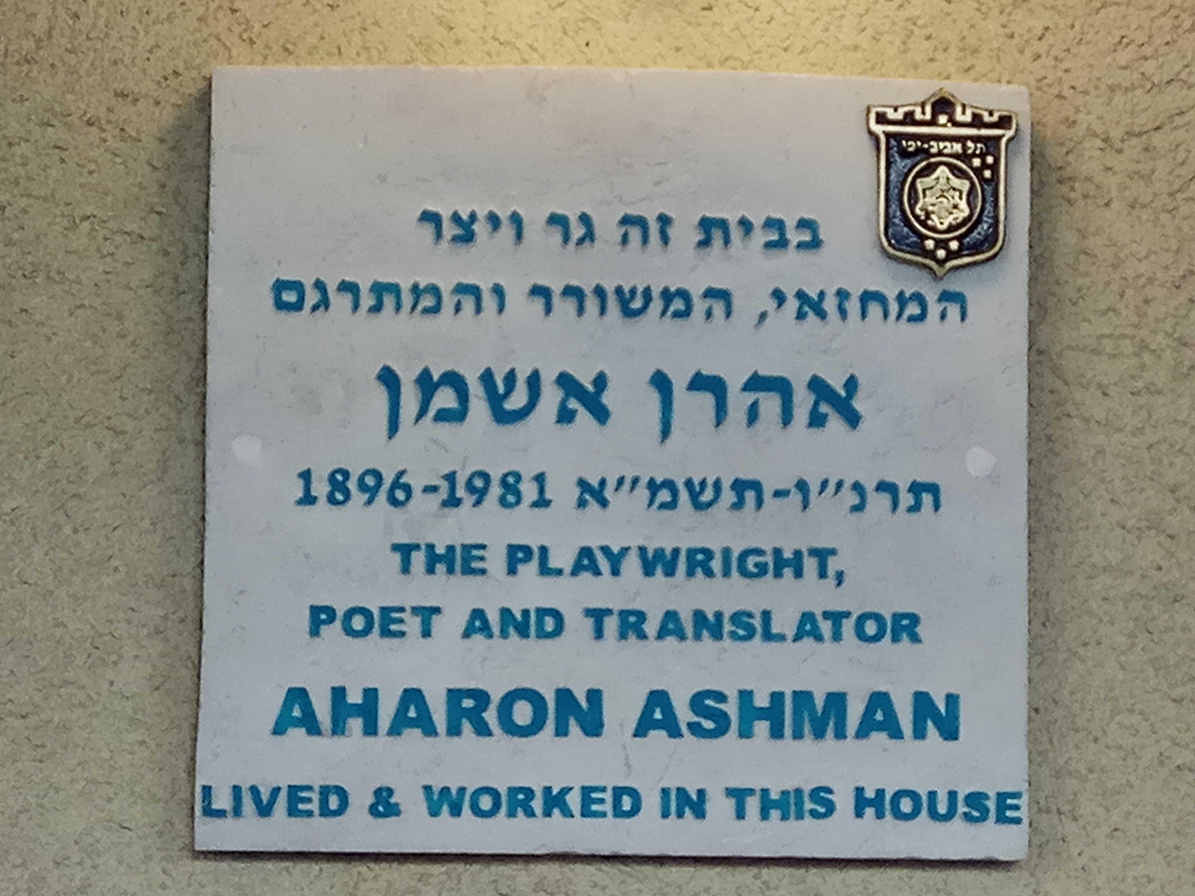 לוחית זיכרון בכניסה לביתו של אהרון אשמן ברחוב רייך 5 בתל אביב